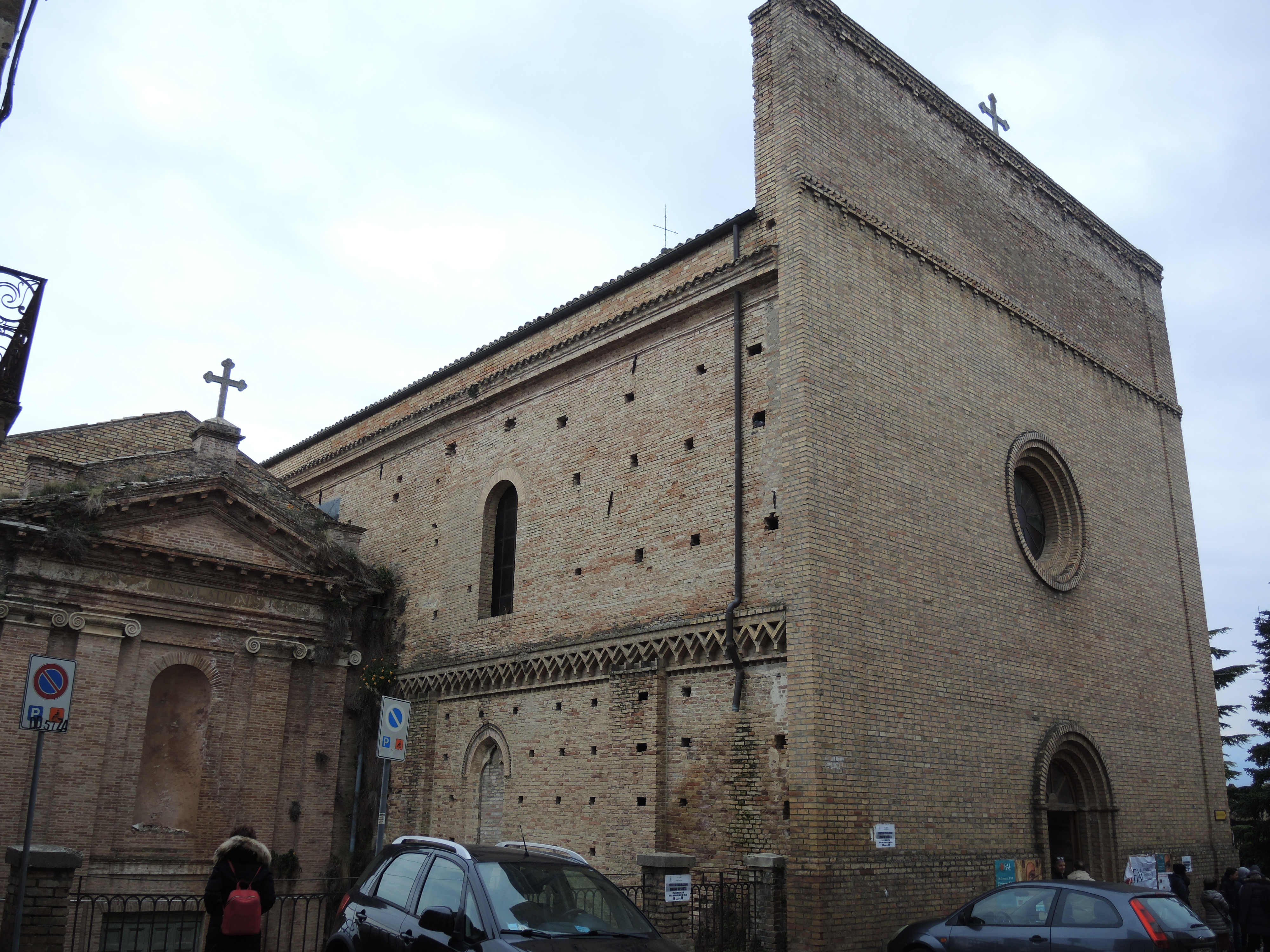 Penne: Chiesa di Sant'Agostino